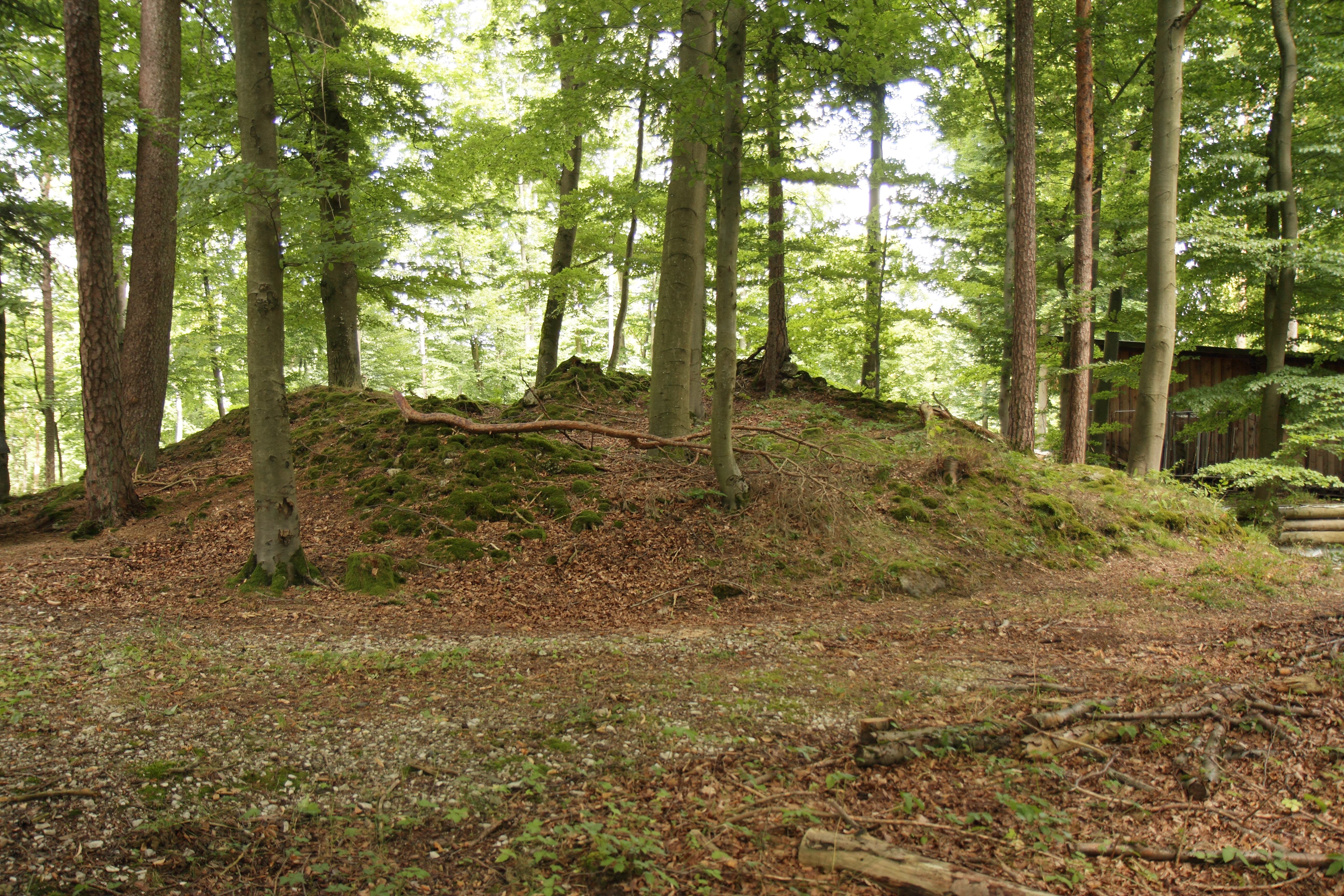 Burgstall Breitenthal - Ansicht der Turm-Ruine